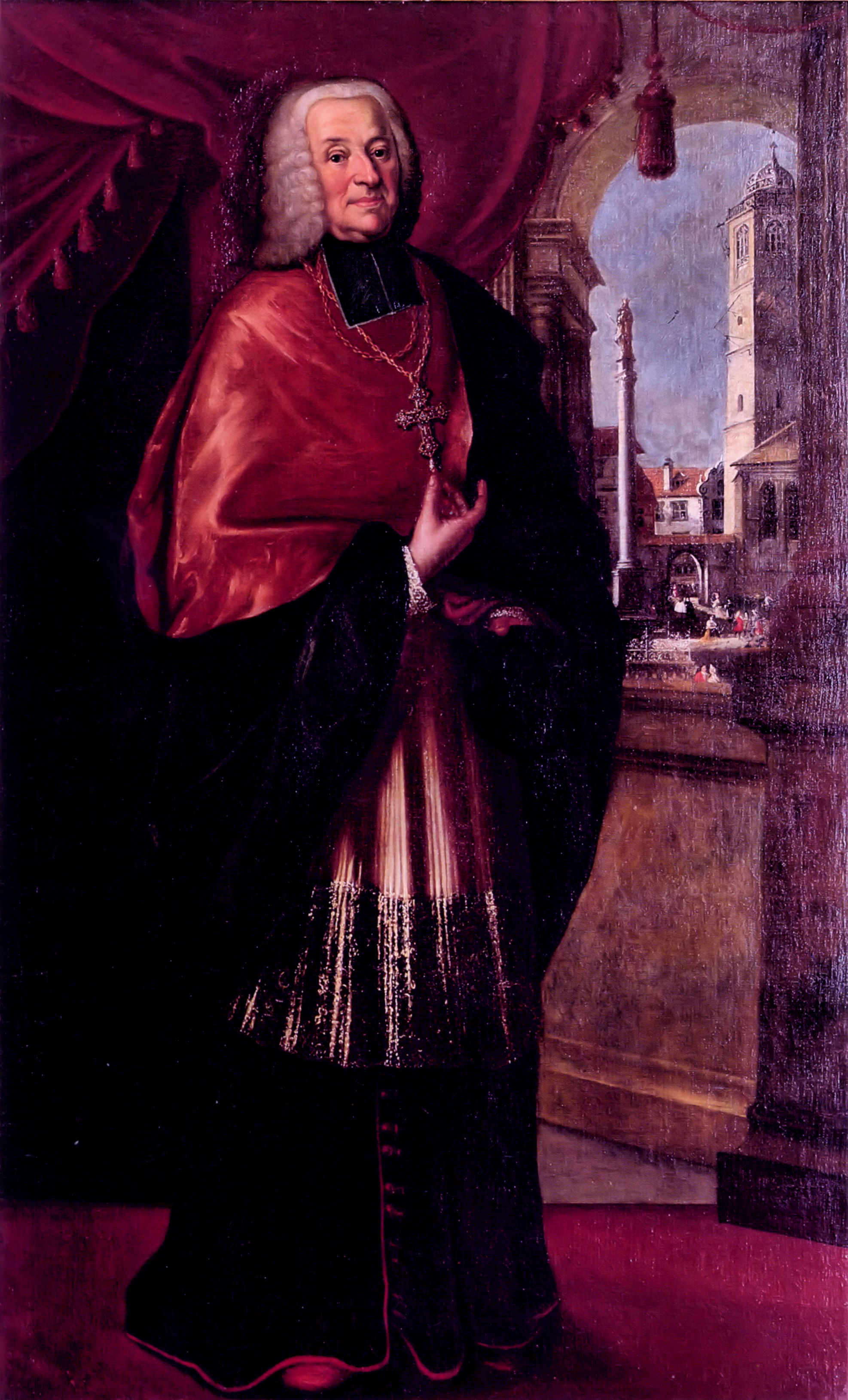 Portrait of Johann Franz Schenk von Stauffenberg (1658-1740), Bishop of Konstanz and Augsburg, in full ornatelabel QS:Len,"Portrait of Johann Franz Schenk von Stauffenberg (1658-1740), Bishop of Konstanz and Augsburg, in full ornate" label QS:Lde,"Johann Franz Schenk von Stauffenberg, Bischof von Augsburg und Konstanz, im vollen Ornat. Im Hintergrund das Konstanzer Münster."